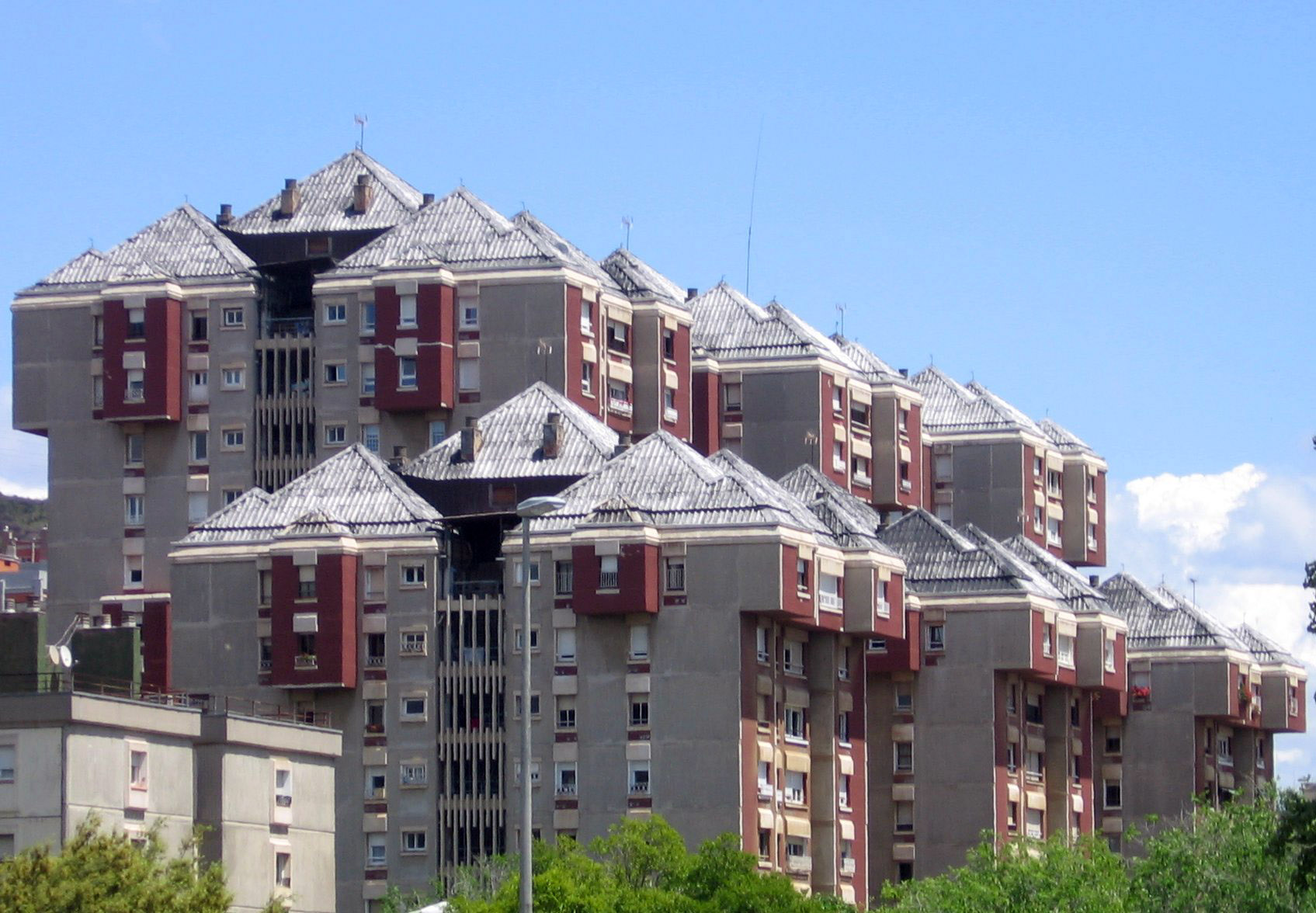 Polígono de viviendas de Canyelles, Barcelona.